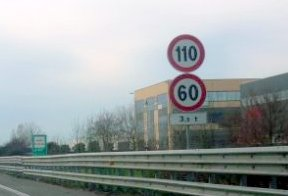 AUTOSTRADA A57---TANGENZIALE DI MESTRE TRA MARCON E L'A27.jpg